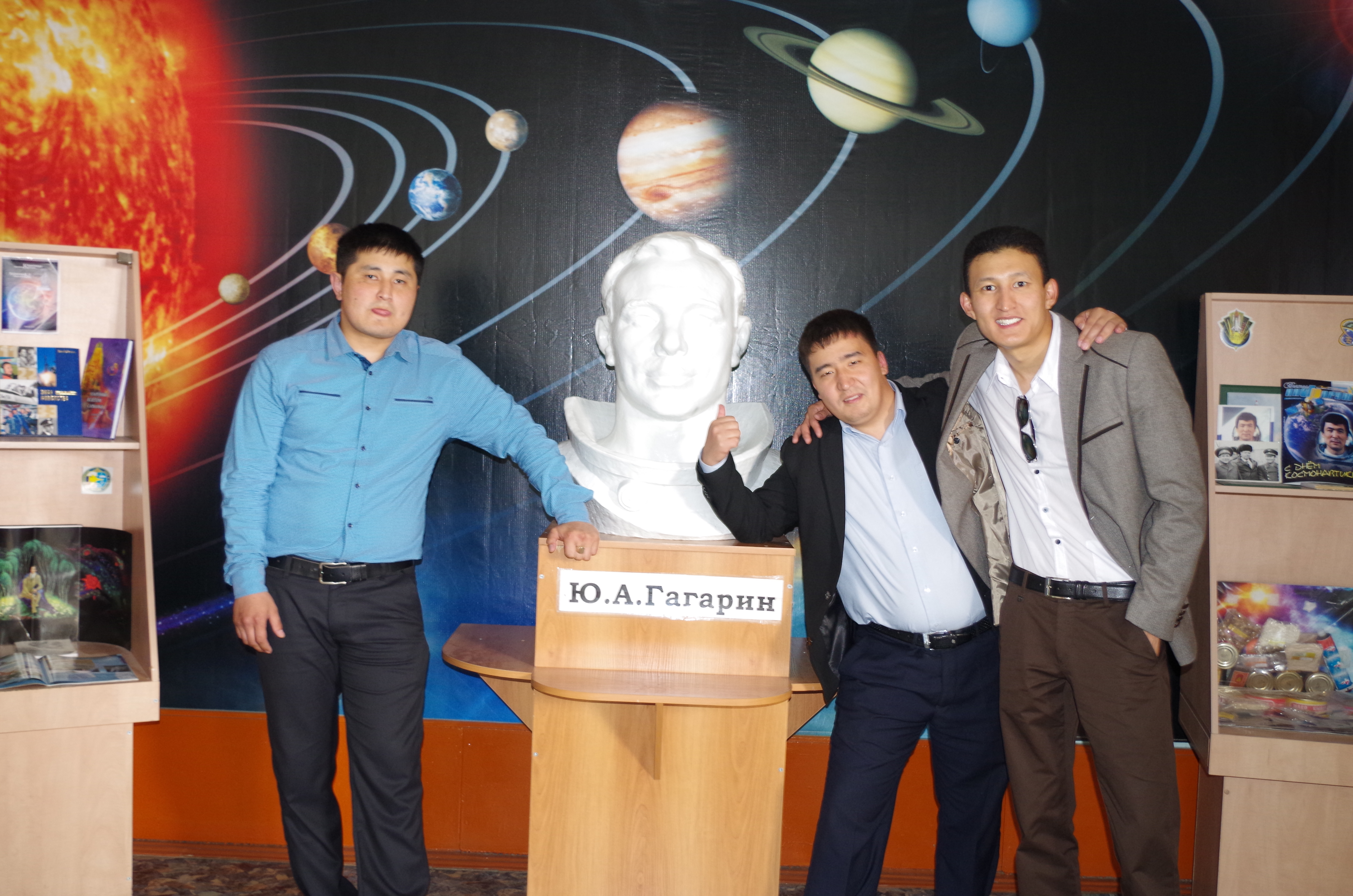 Бюст Ю.А.Гагарина в одноименной школе.